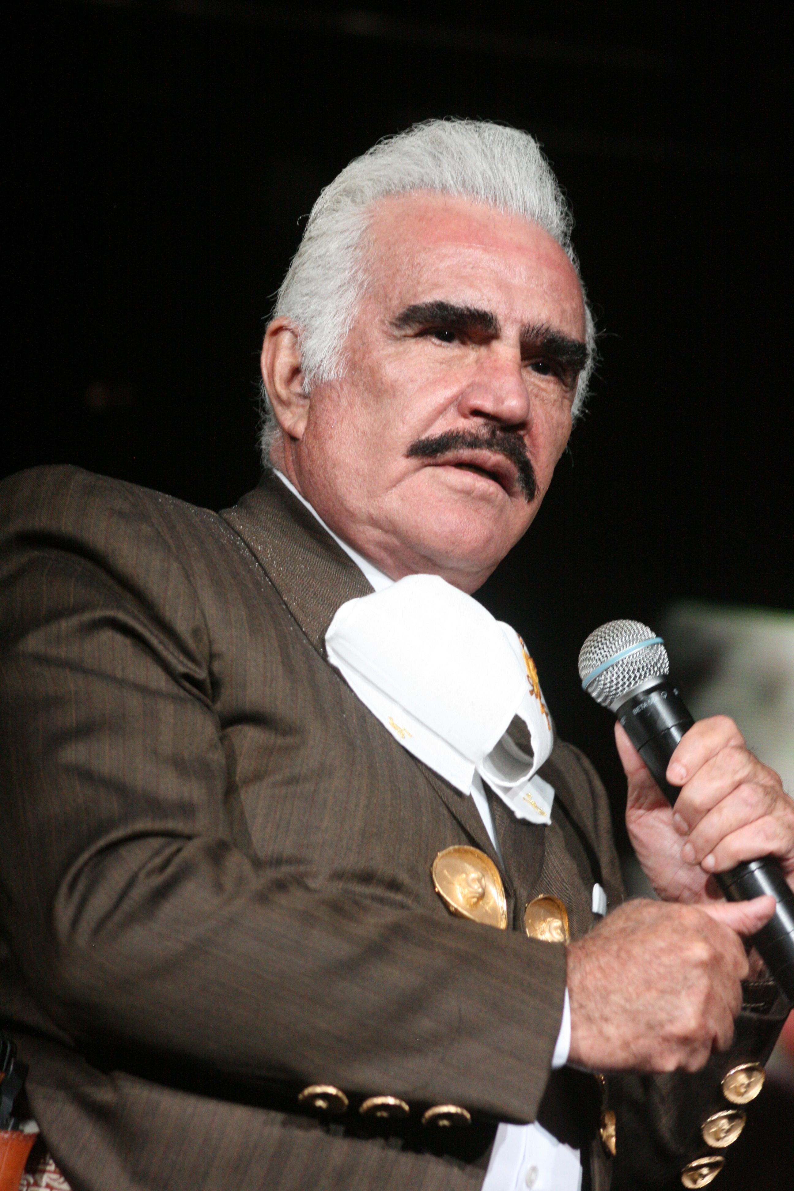 Vicente Fernandez ::: Pepsi Center ::: 06.11.11